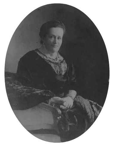 Софии Владимировне Уварова, ур. Яшвиль (25.05.1854—после 1913)